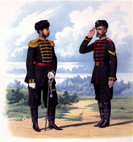 Штаб-Офицер и Унтер-Офицер Л.Гв. Стрелкового батальона Императорской Фамилии. (Городская праздничная форма). 10 Июля 1867.